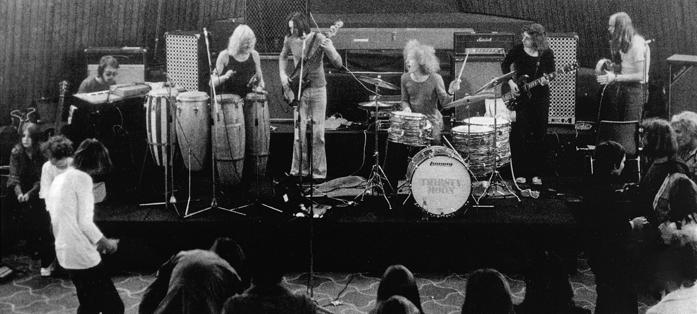 Thirsty Moon 1973, v.l.n.r. Michael Kobs, Erwin Noack, Harald Konietzko, Norbert Drogies, Jürgen Drogies, Willi Pape